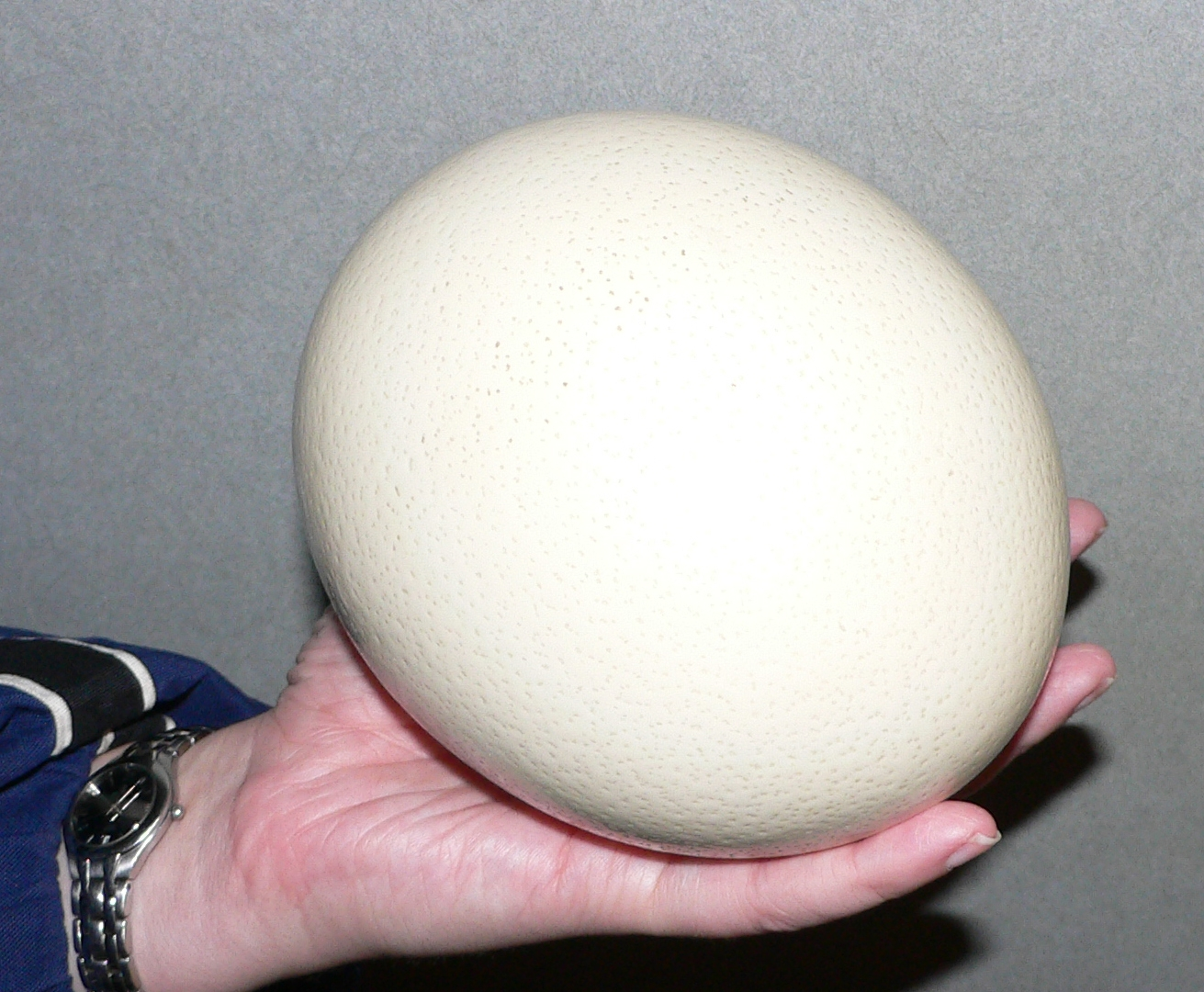 Straussenee.